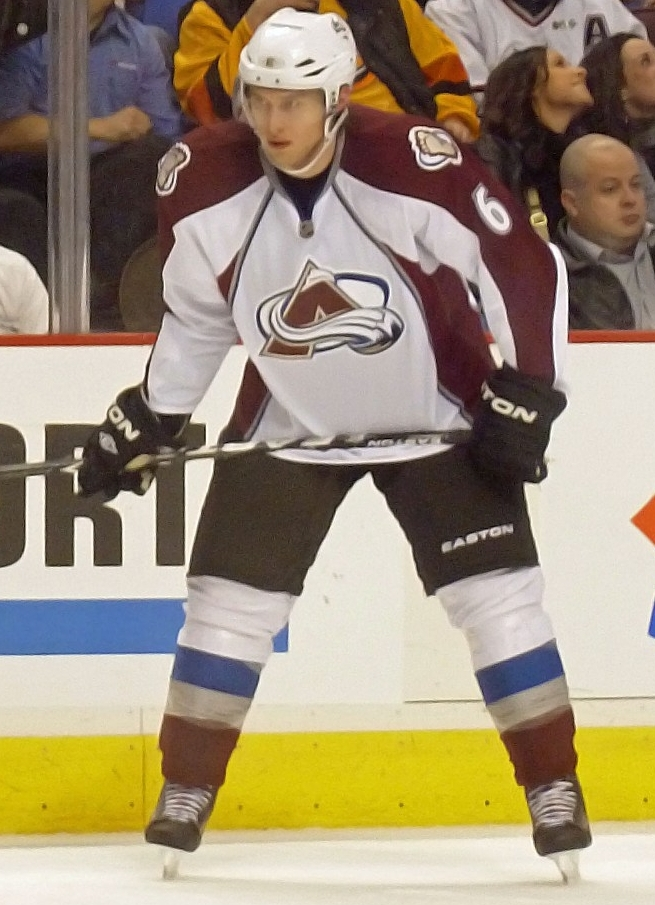 Col @ Van, 16-Mar-2011